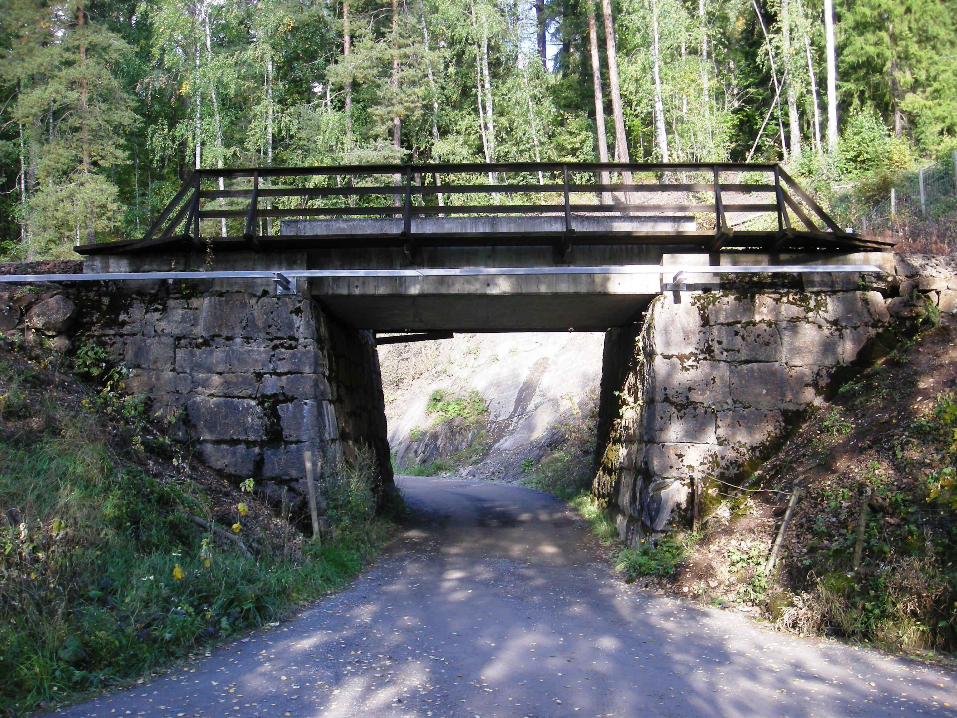 Fylkesvei 1688 går gjennom en undergang under Dovrebanen like ved nedlagte Veldre stasjon.